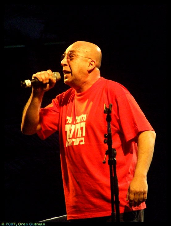 Rami Fortis